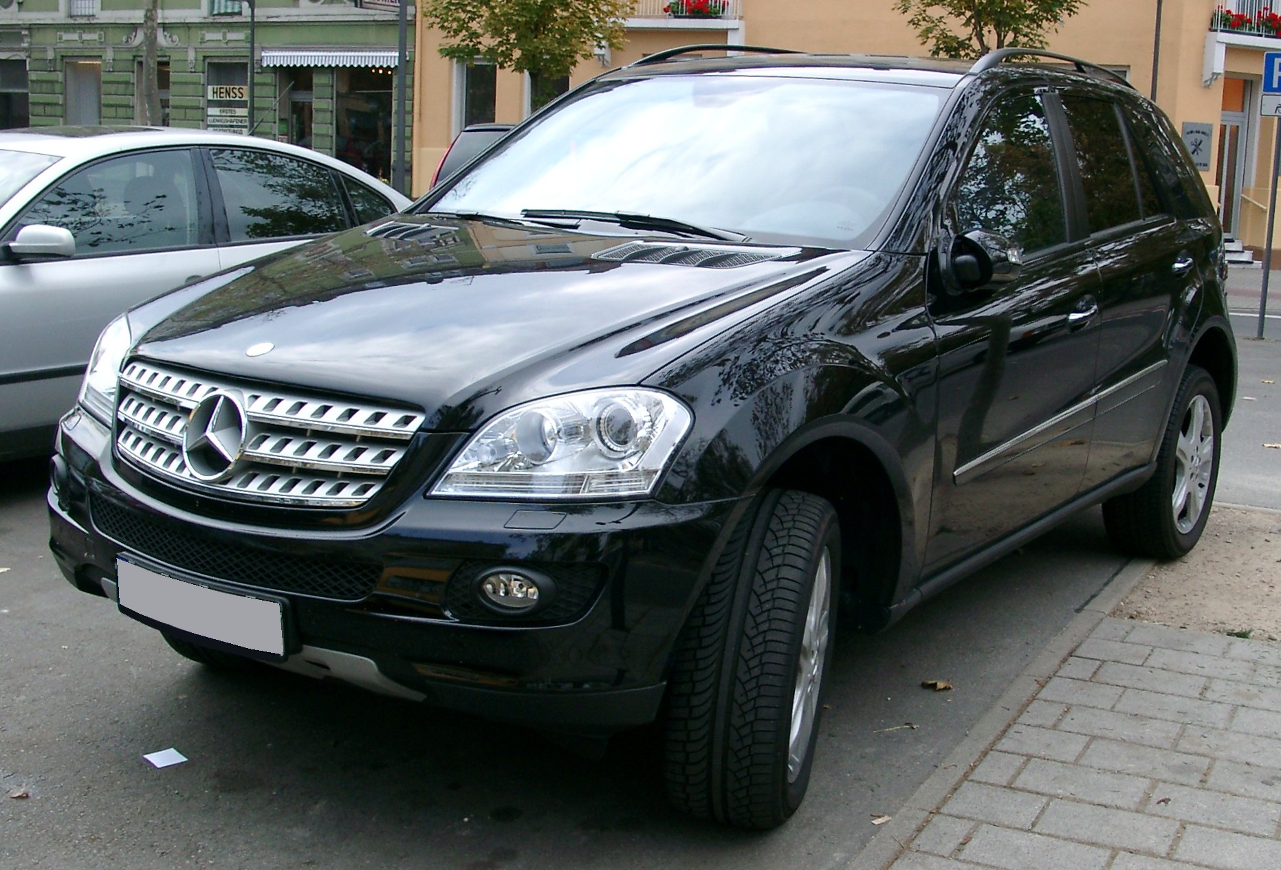 Mercedes-Benz W164